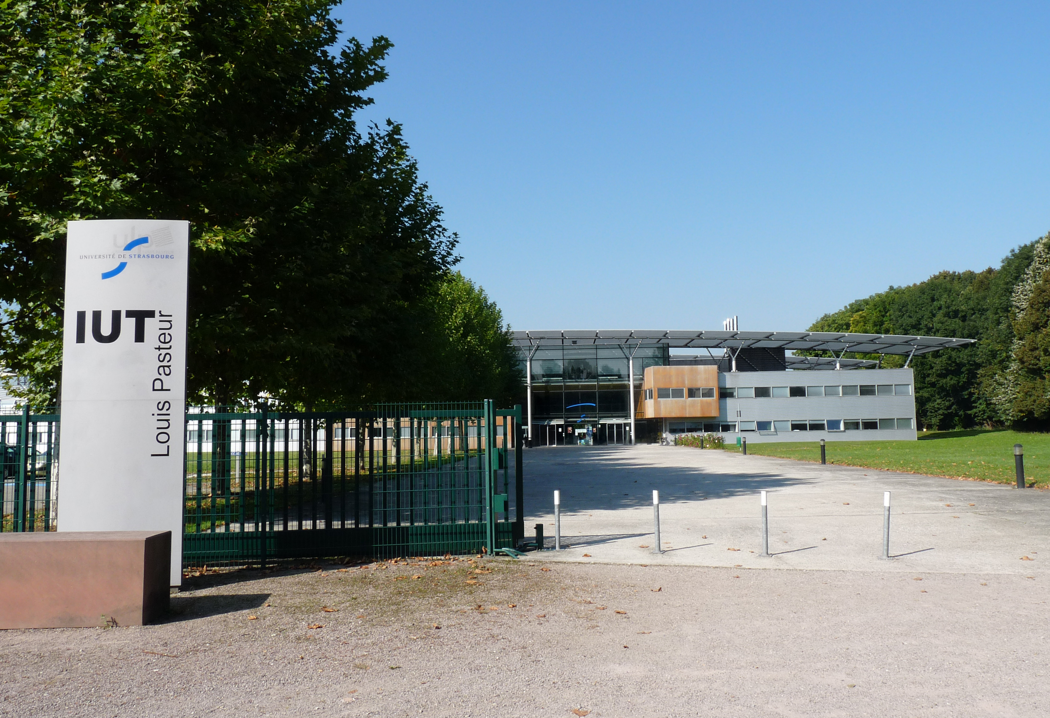 Institut universitaire de technologie (IUT) Louis Pasteur à Schiltigheim (Bas-Rhin). Composante de l'Université de Strasbourg.